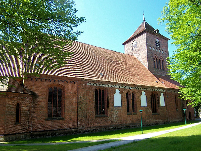 Kirche in Grevesmühlen, Landkreis Nordwestmecklenburg